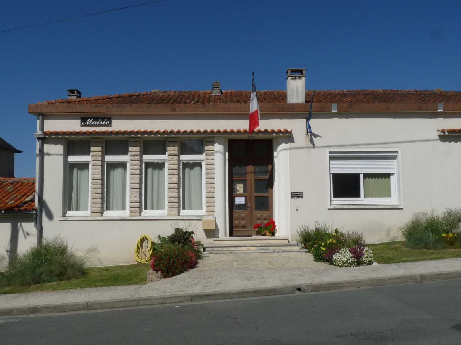 Mairie de St-Maigrin, Charente-Maritime, France